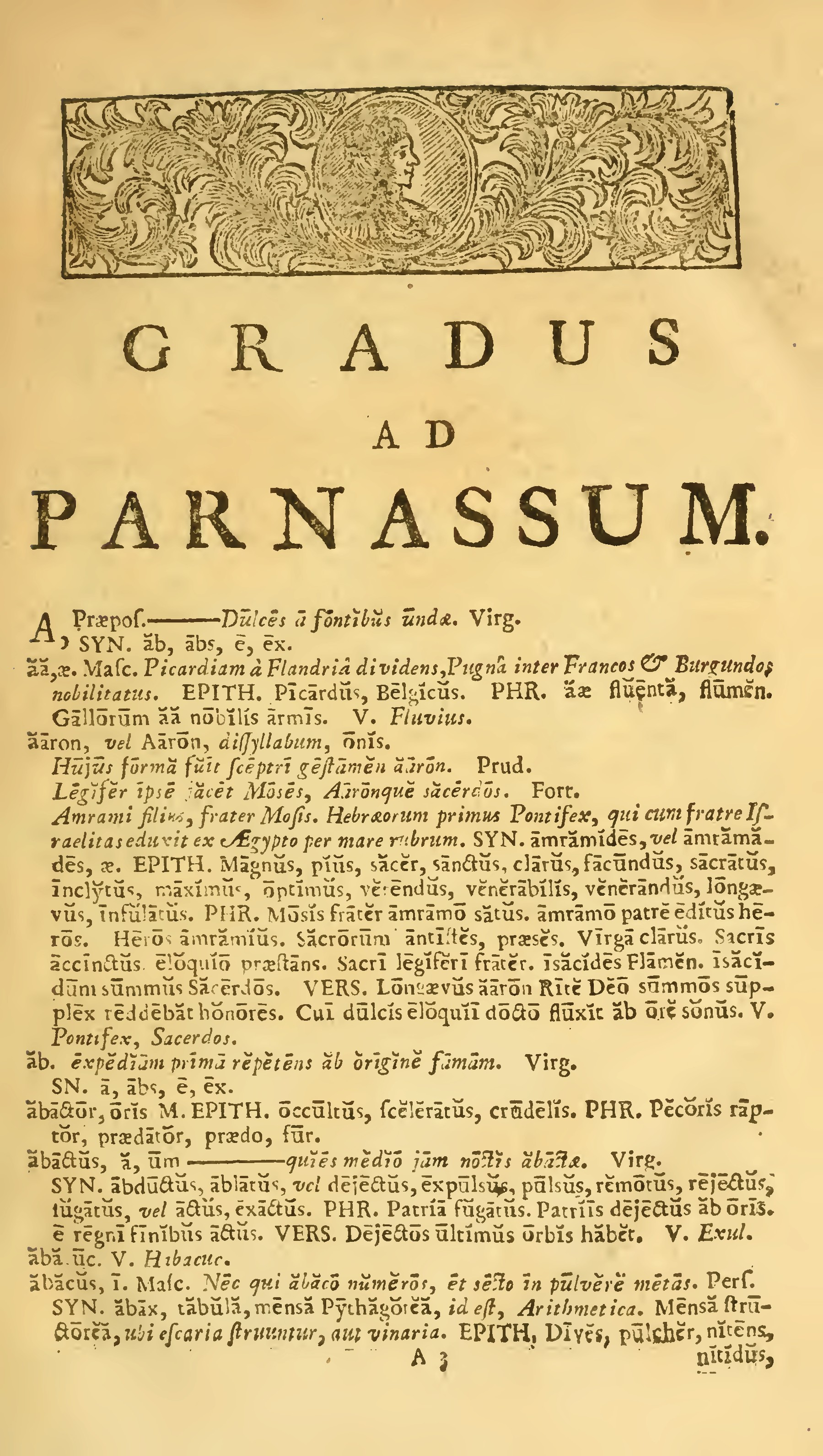 Страница Gradus ad Parnassum , London, 1720